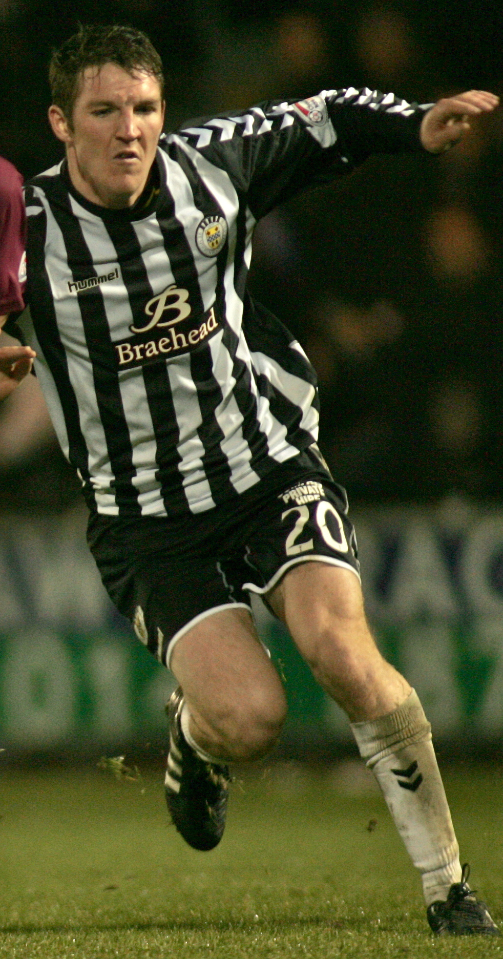 St Mirren vs Hearts